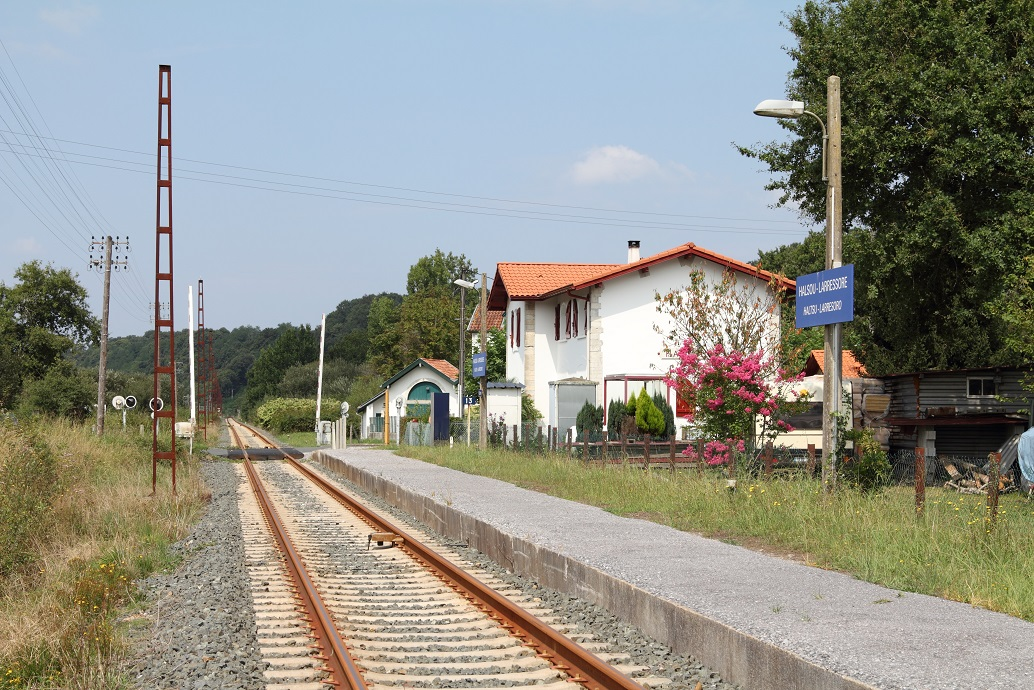 La petite gare de Halsou - Larressore en août 2013, Aquitaine, France.